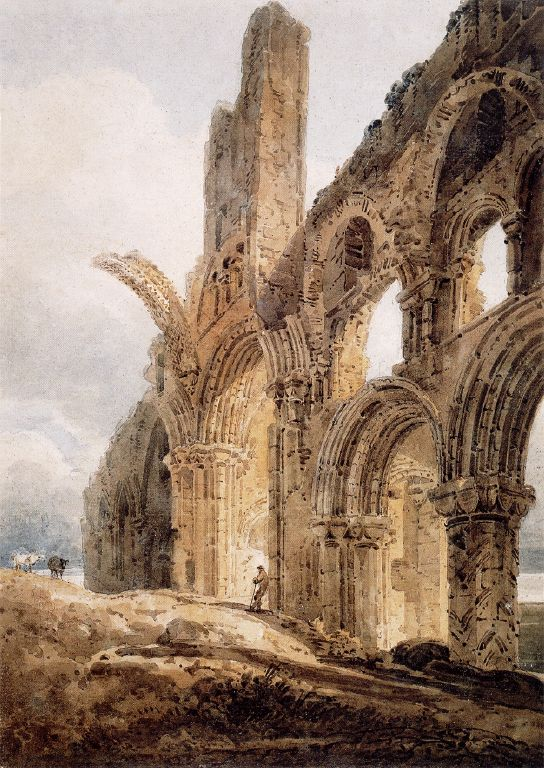 Lindisfarne